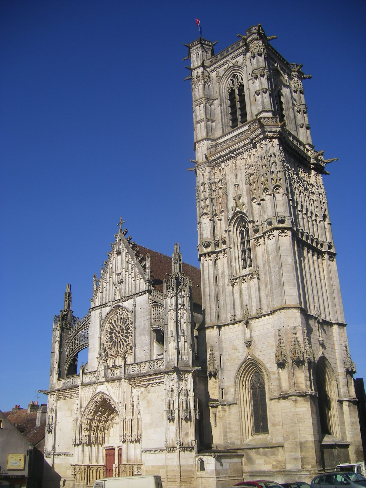 Collégiale Saint-Martin de Clamecy